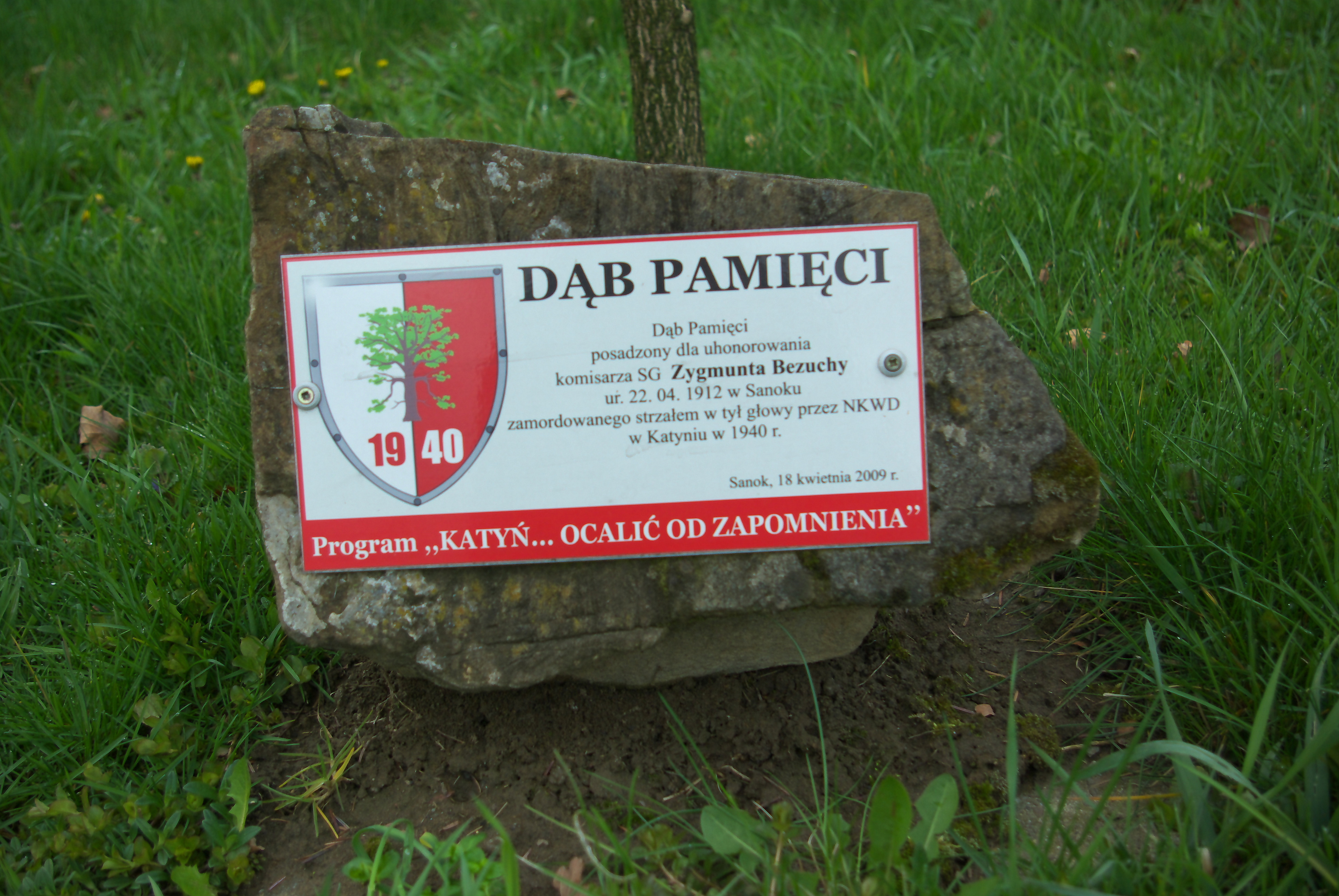 Kamień pamiątkowy przy Dębie Pamięci honorującym Zygmunta Bezuchę na Cmentarzu Centralnym w Sanoku